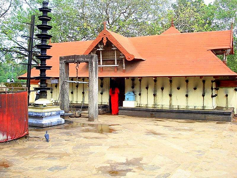 ക്ഷേത്രപാലകൻറെ നട